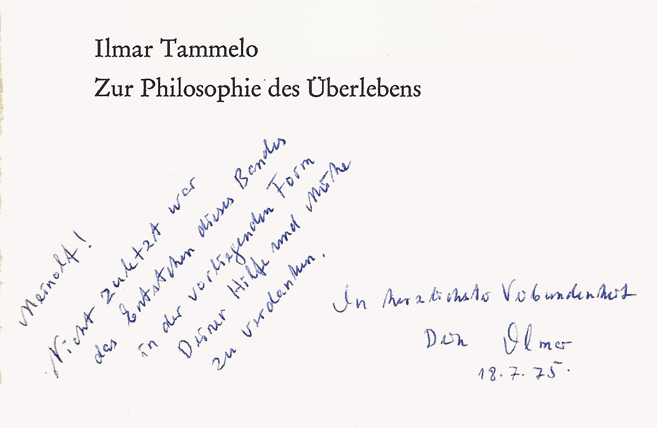 Widmung seines 1975 eschienen Buches »Zur Philosophie des Überlebens. Gerechtigkeit, Kommunikation und Eunomik«.